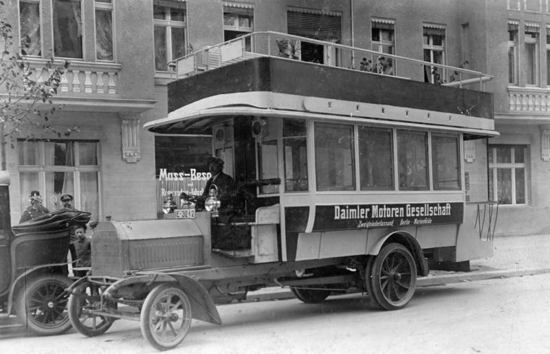 Berlin, Daimler-Doppeldecker-Bus Scherl Bilderdienst Die Lastwagen-Konkurrenz des Kaiserlichen Automobil-Klubs. Ein Doppeldeck-Omnibus. ADN-ZB-Archiv Berlin 1907 Ein Doppeldeck-Omnibus. 15609-07 [Berlin.- Doppelstock-Bus mit seitlicher Aufschrift "Daimler Motoren Gesellschaft, Zweigniederlassung Berlin-Marienfelde"]